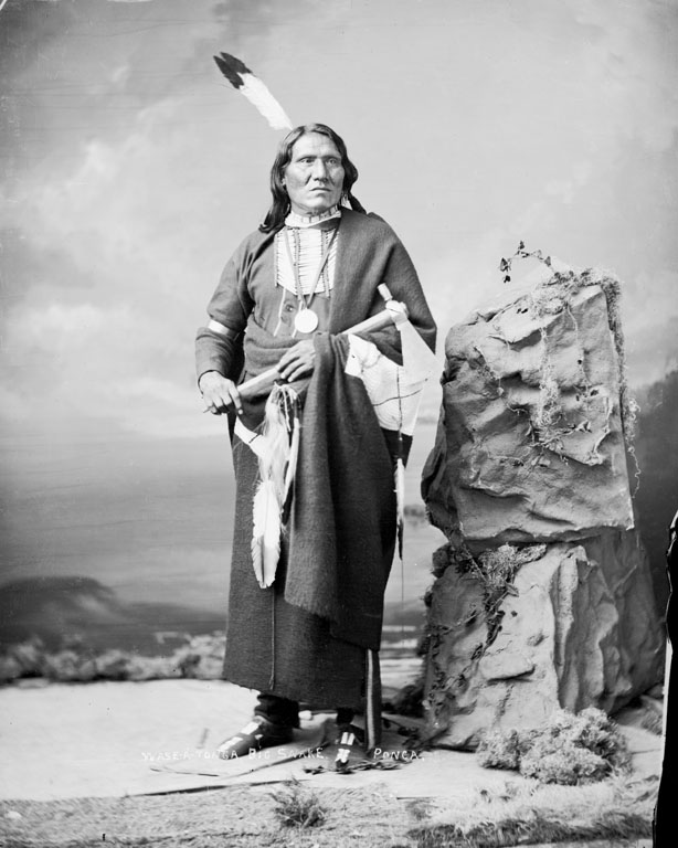 Big Snake (frère de Standing Bear) de latribu Ponca. Cliché pris en 1877.